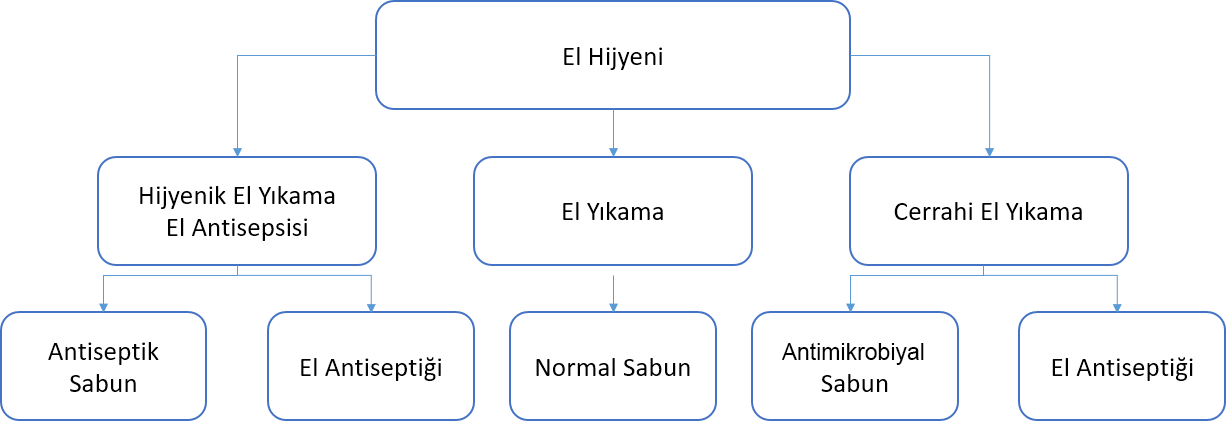 El yıkama prensipleri.